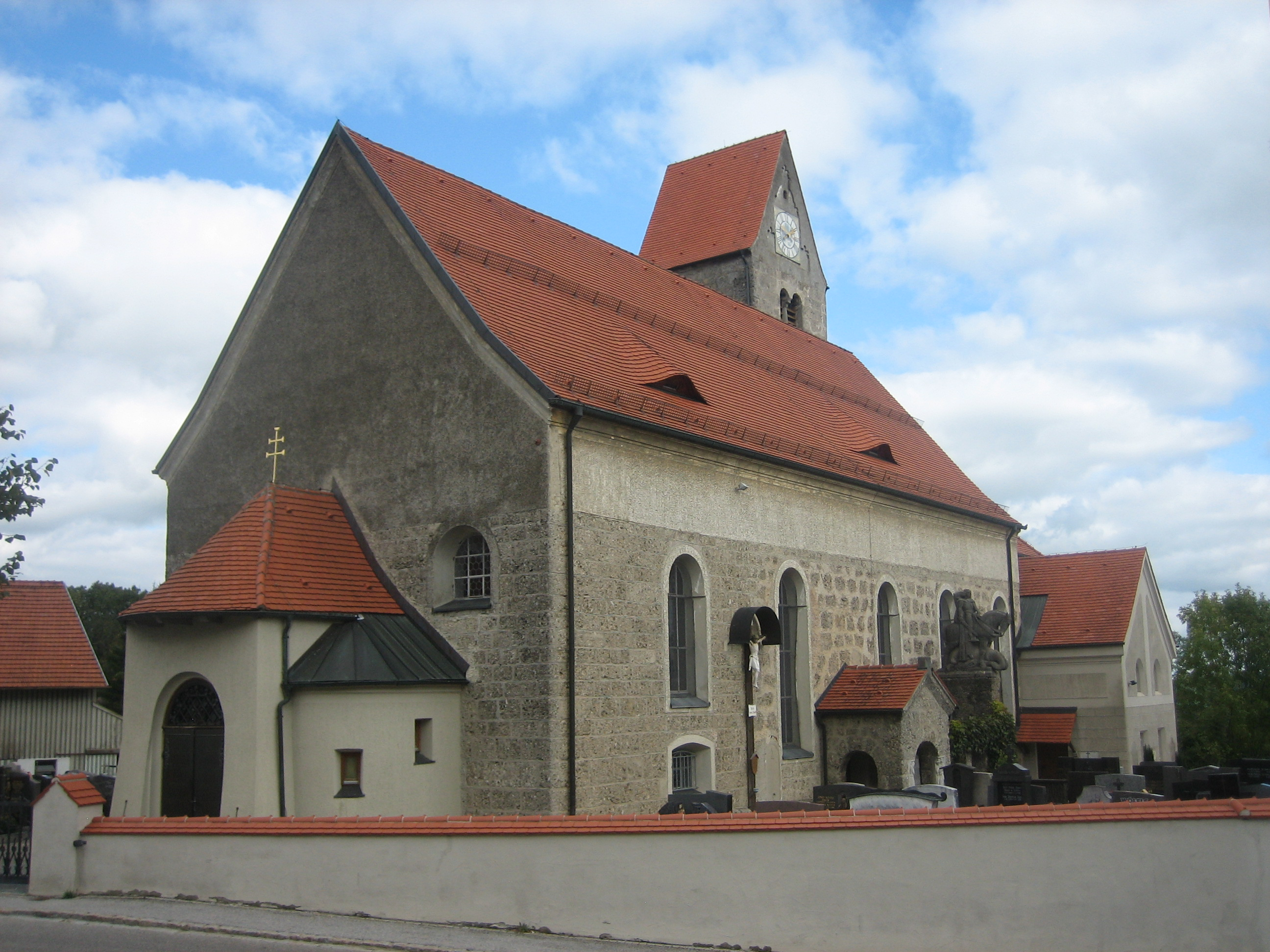 St. Georg, Gemeinde Böhen, Landkreis Unterallgäu, Bayern